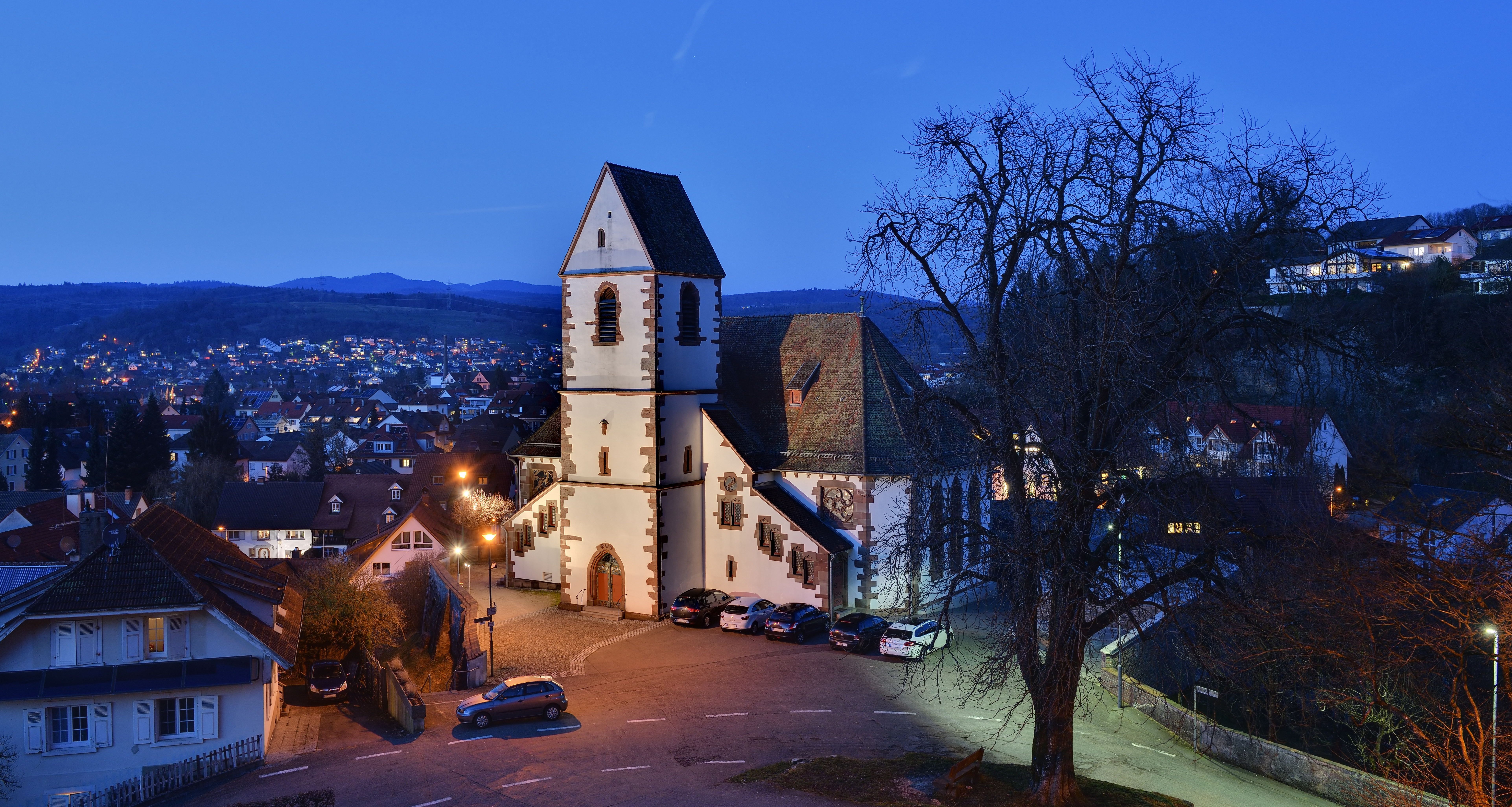 Germanuskirche in Lörrach-Brombach zur Blauen Stunde